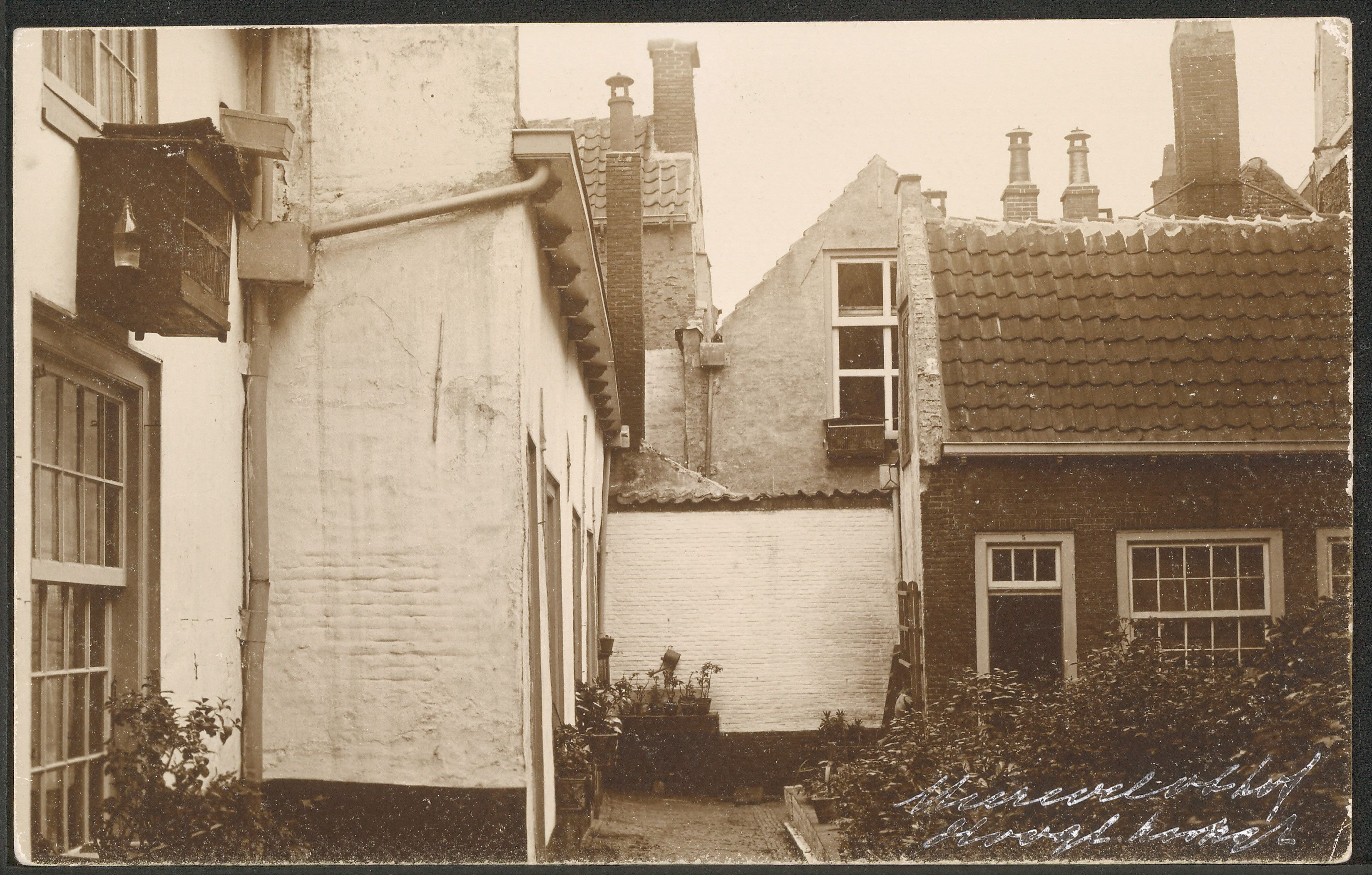 De binnenzijde van het Mierennesthofje aan de Hooglandsekerkgracht 38.